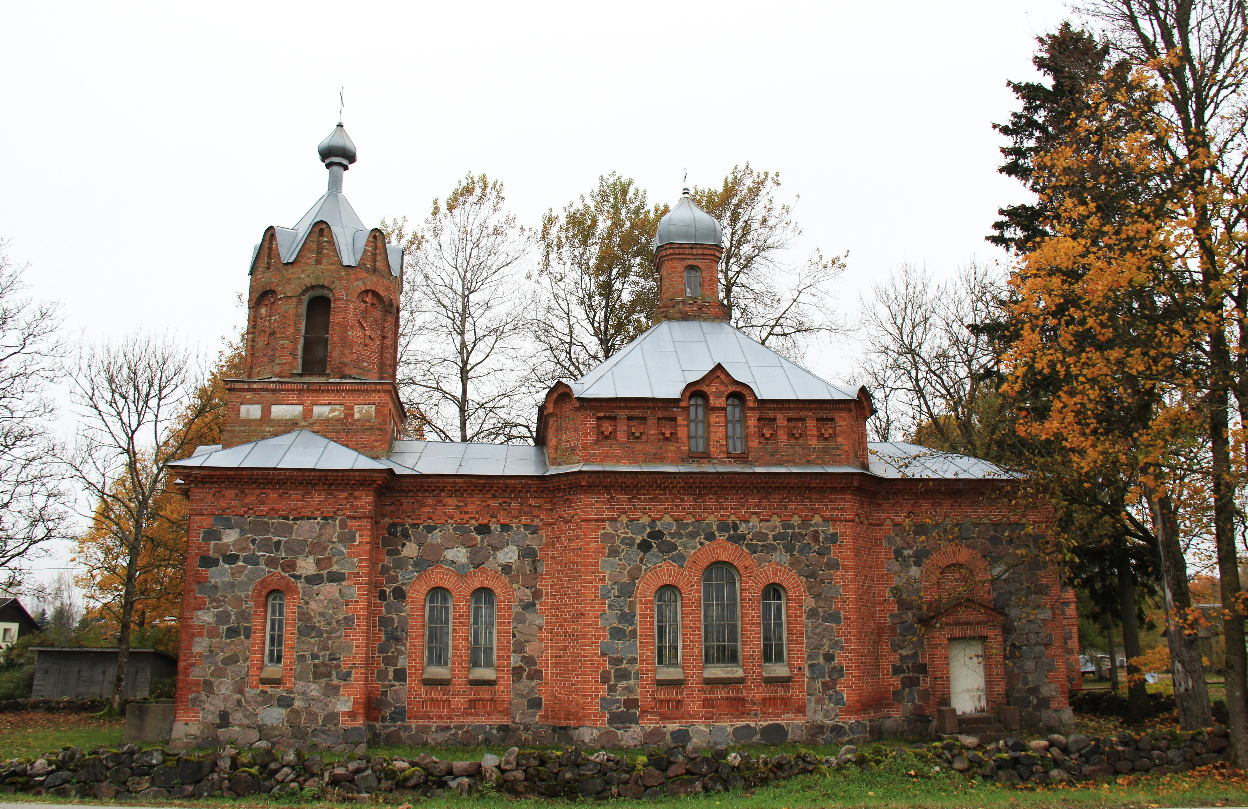 Kergu õigeusu kirik